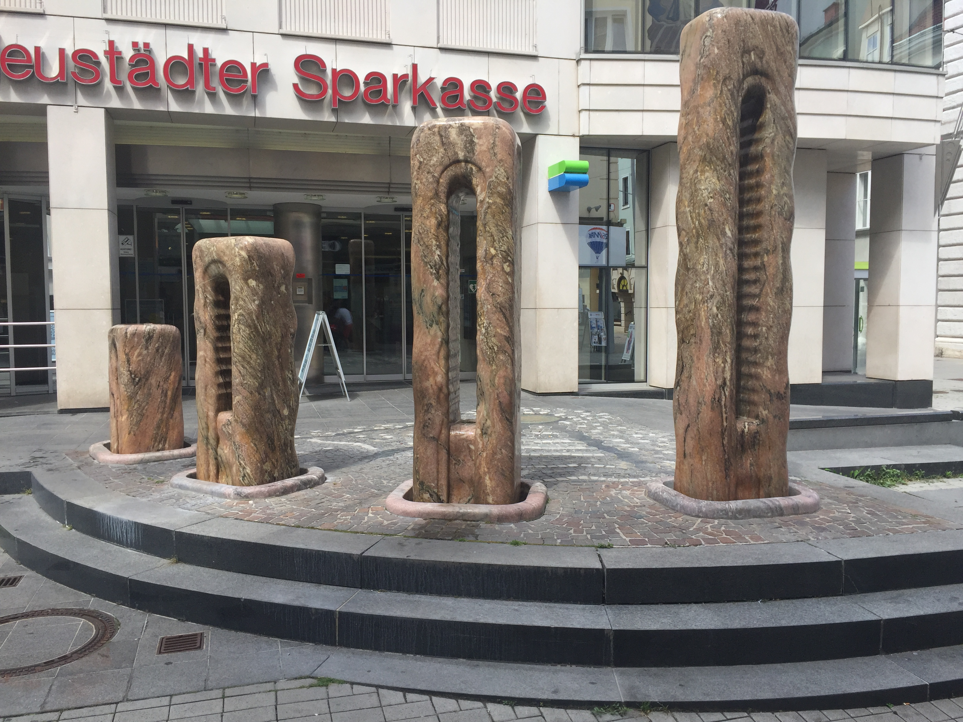 Sparkassenbrunnen: Gestaltung durch Prof. Hans Muhr, errichtet im Jahr 1993 anlässlich der Neugestaltung des Kundenzentrums von der Wiener Neustädter Sparkasse in der Neunkirchner Straße 4, 1995 der Stadt Wiener Neustadt als Geschenk übergeben.